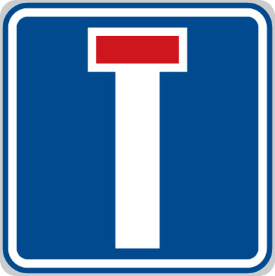 Slepá pozemní komunikace